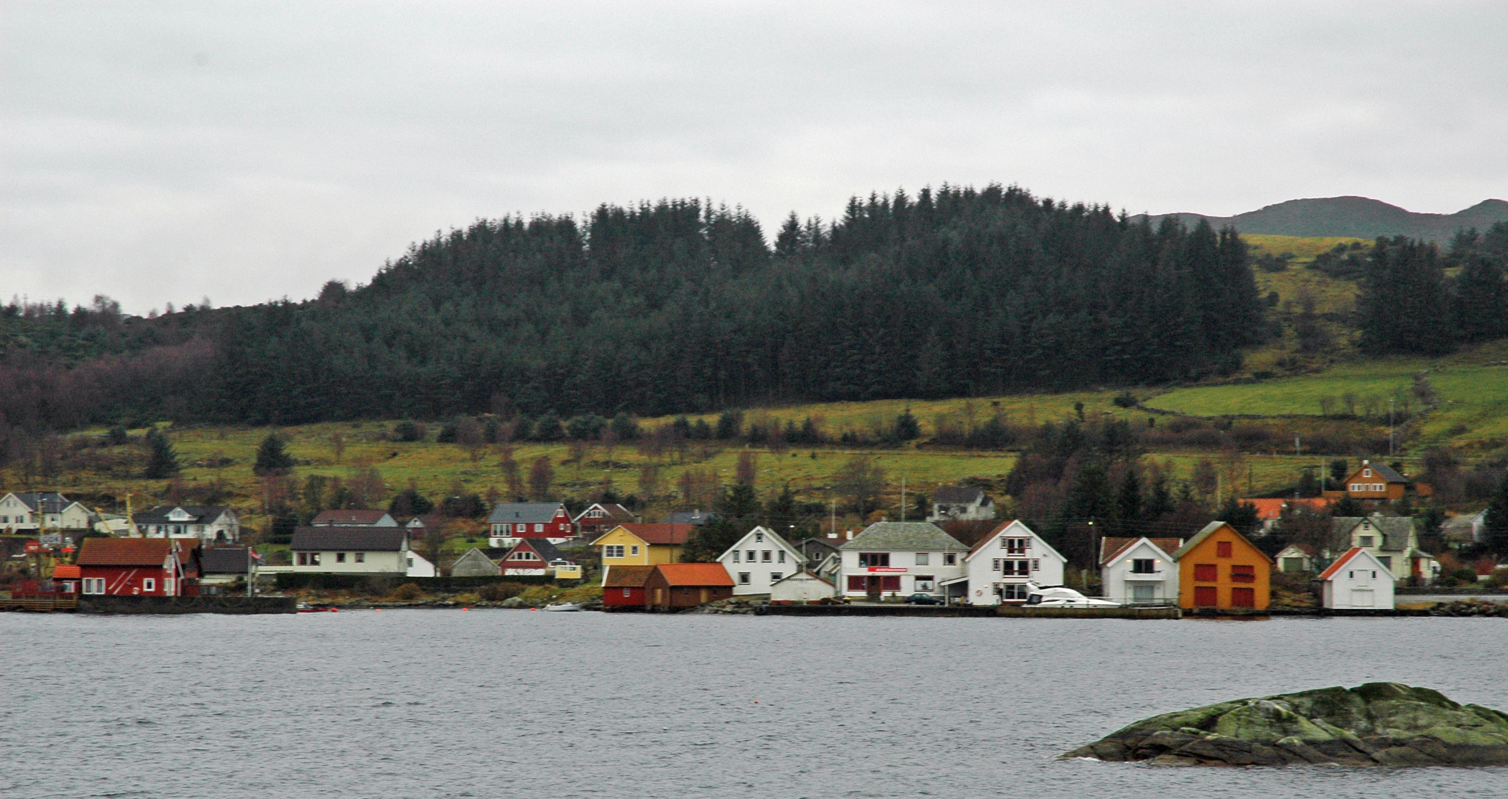 Alvestadkroken, Bokn